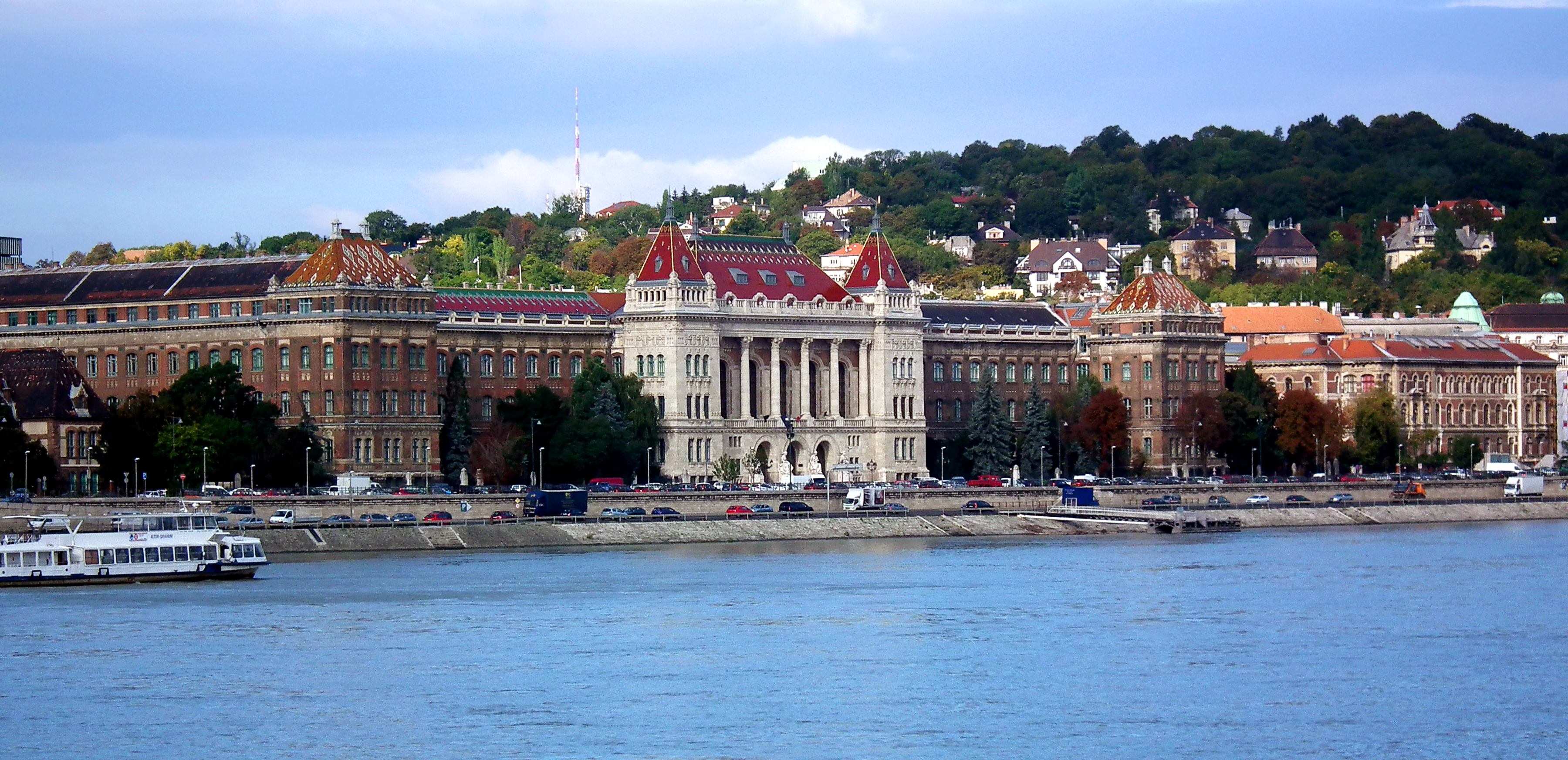 Budapesti Műszaki Egyetem K és CH épületei This is a photo of a monument in Hungary. Identifier: 1110